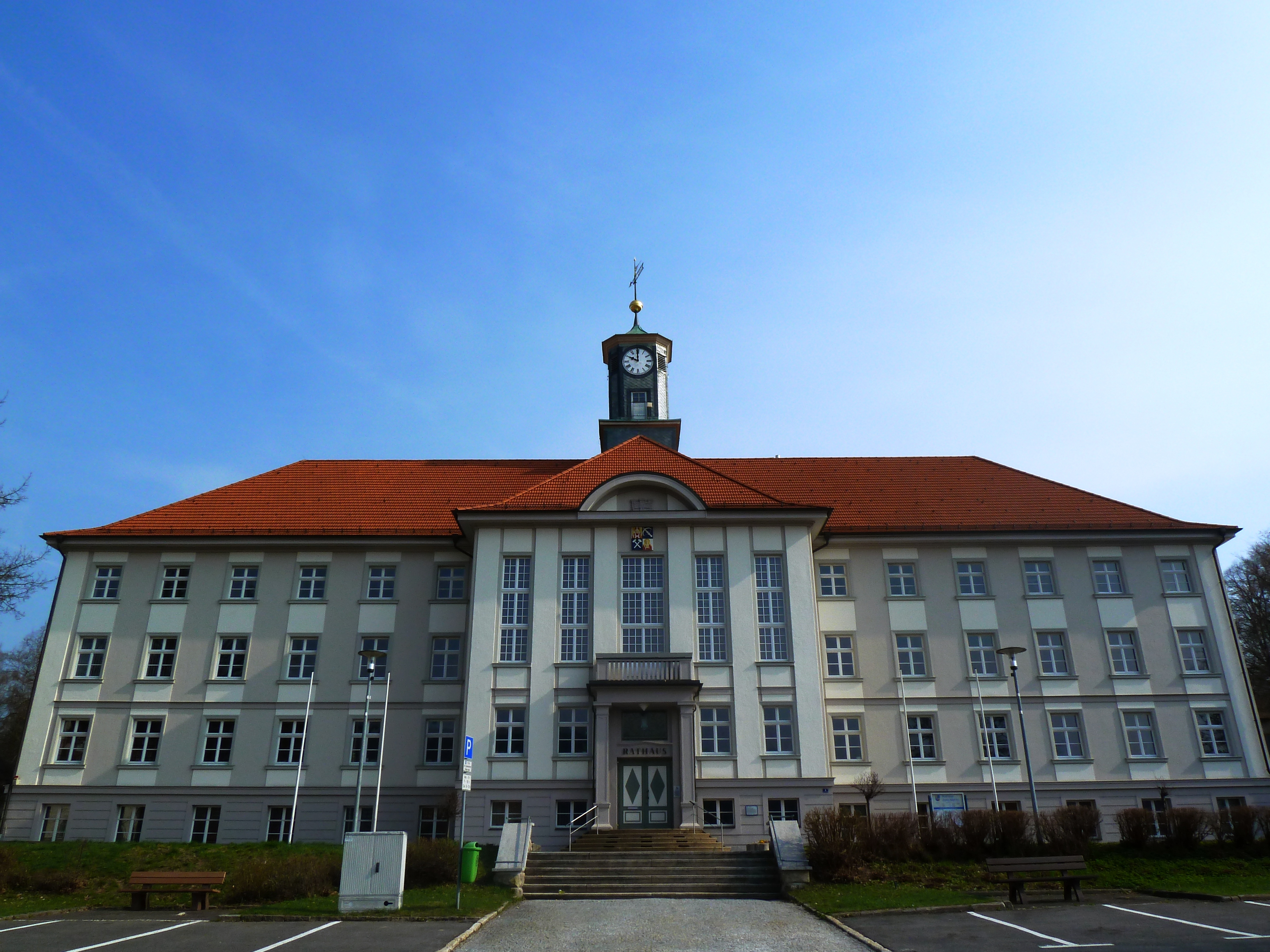 Rathaus der Stadt Zella-Mehlis